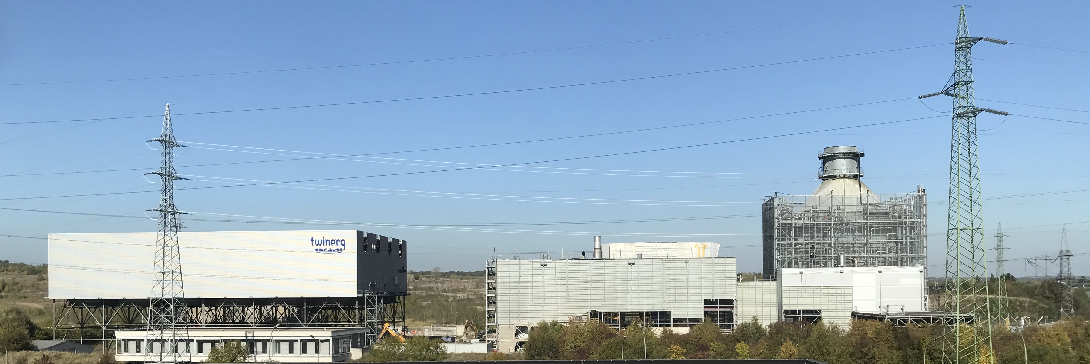 GUD Kraftwerk